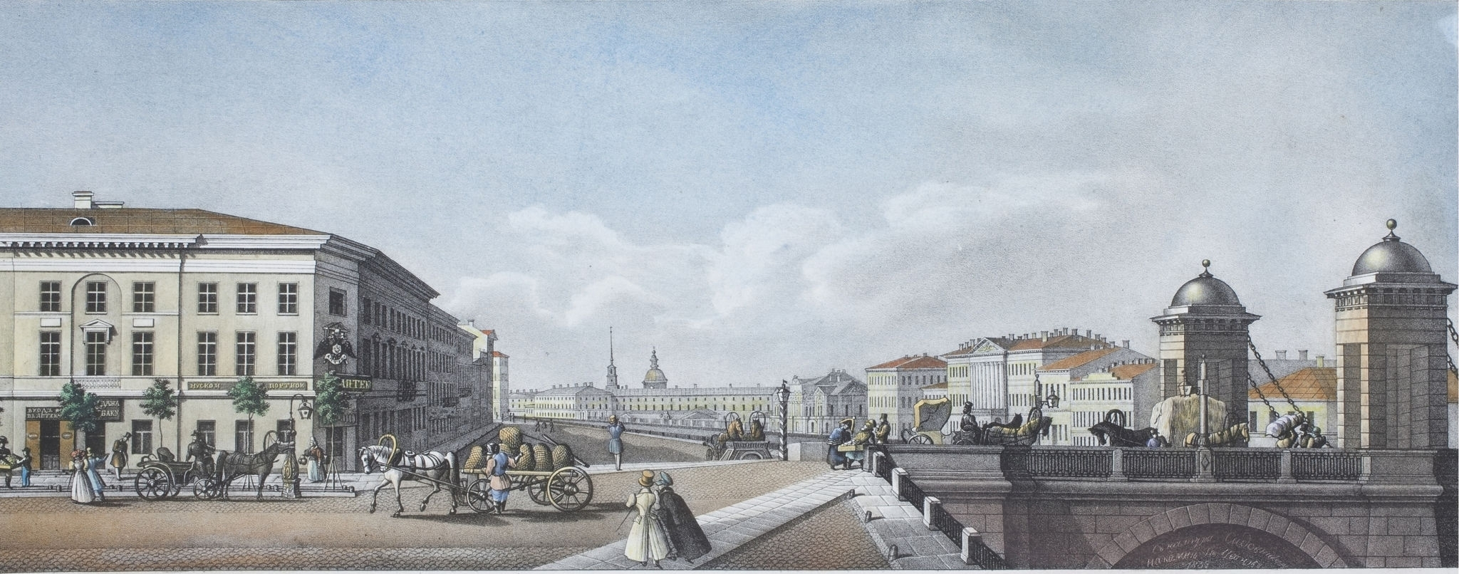 Anichkov bridge in St Petersburg in 1830-ies